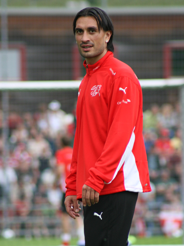 Hakan Yakin im Trainingslager der Schweizer Fussballnationalmannschaft vor der Euro 2008